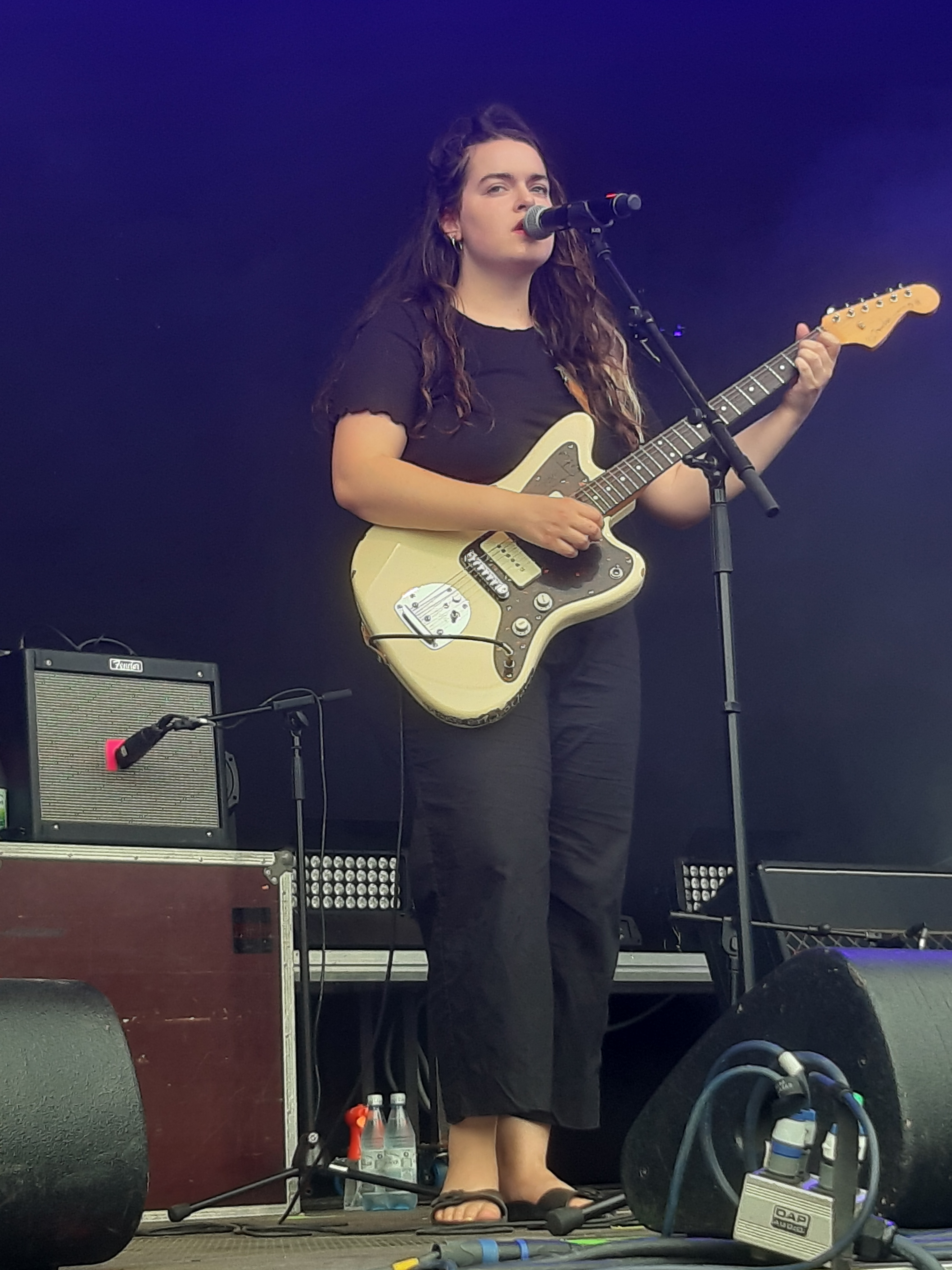 Ilgen-Nur auf dem Heimspiel Knyphausen 2019 in Eltville